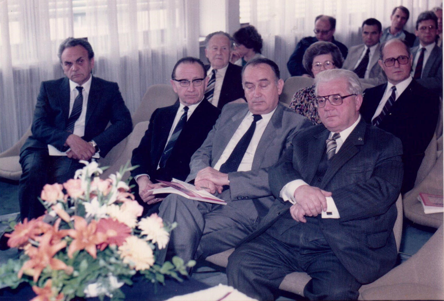 Podelitev Vidmarjeve plakete